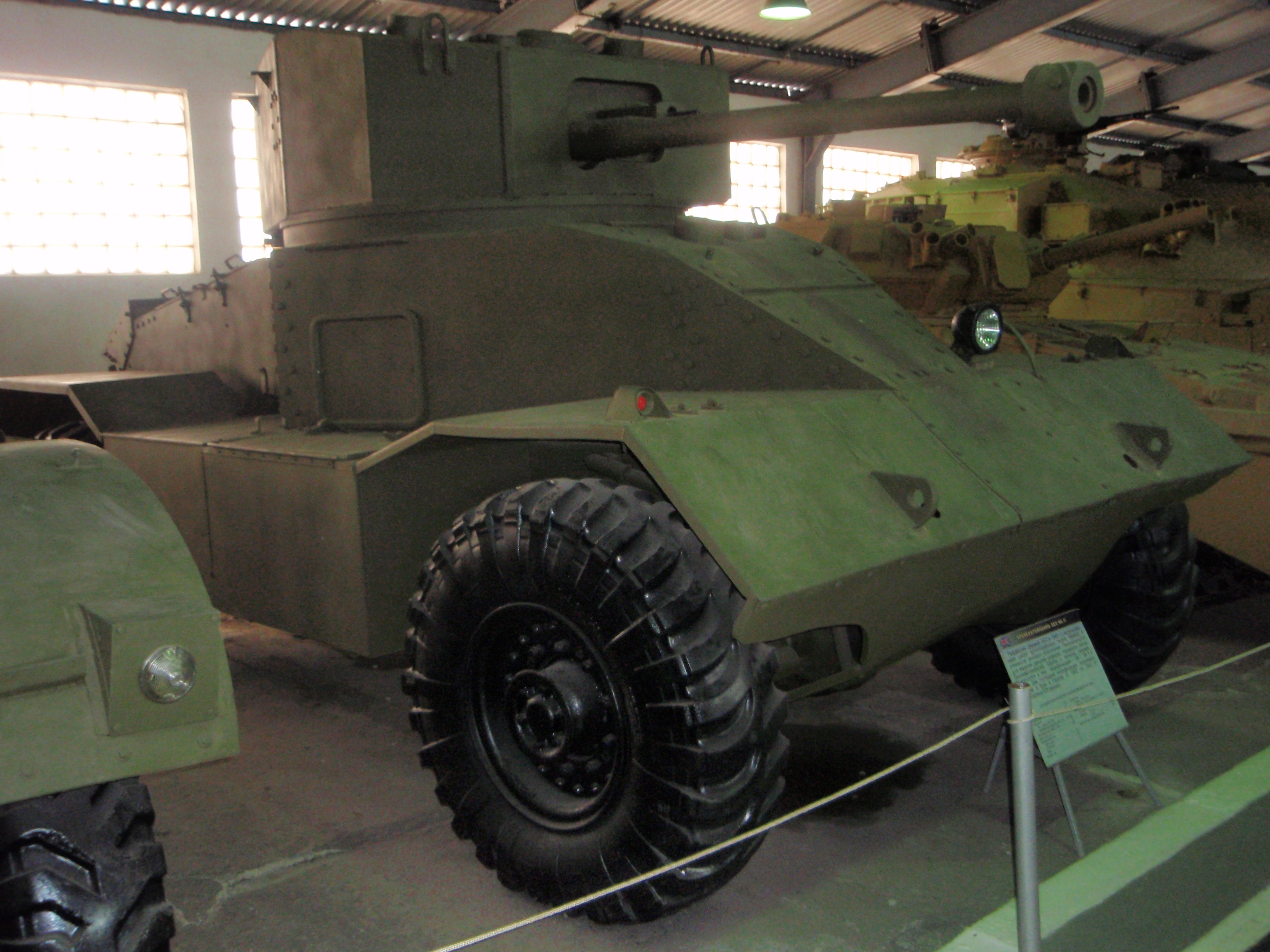 Британский бронеавтомобиль AEC Mk.II в Кубинке